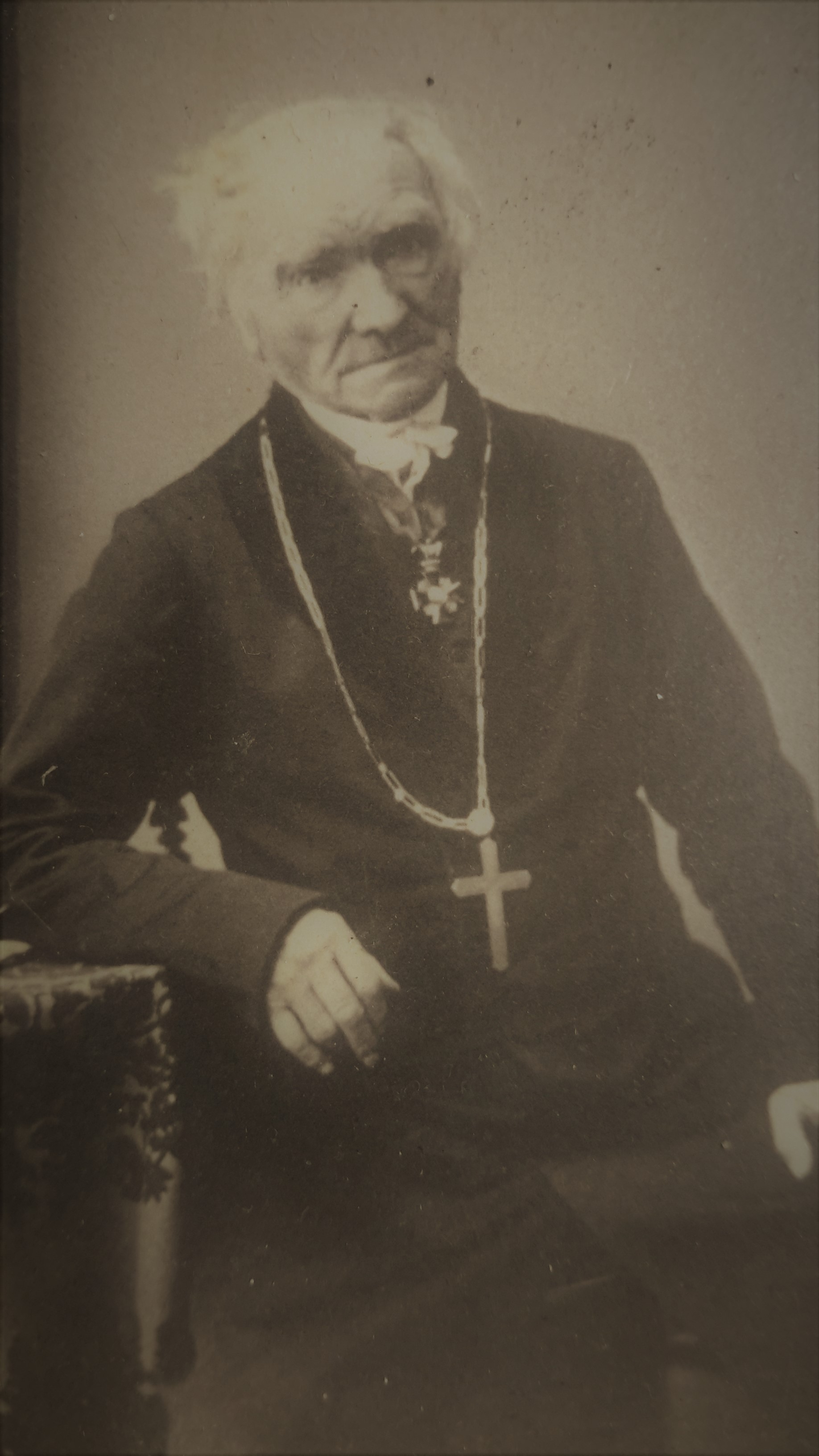 Иоганн Губер, фото